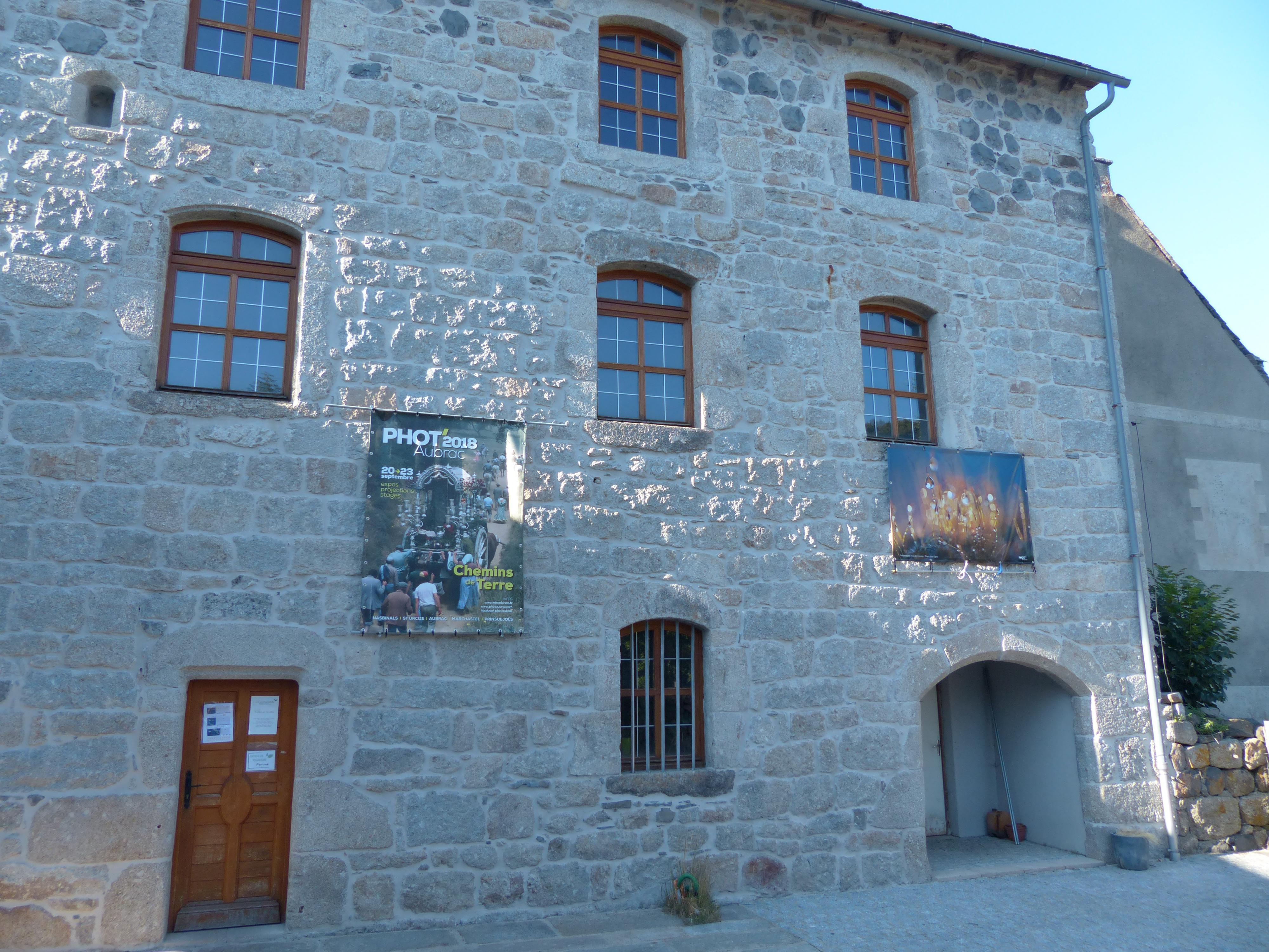 Nasbinals (Lozère). Cour intérieure de la maison Charrier.